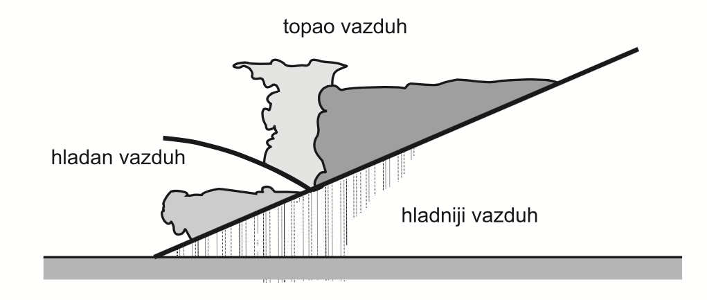 Српски (ћирилица): Топли фронт оклузије